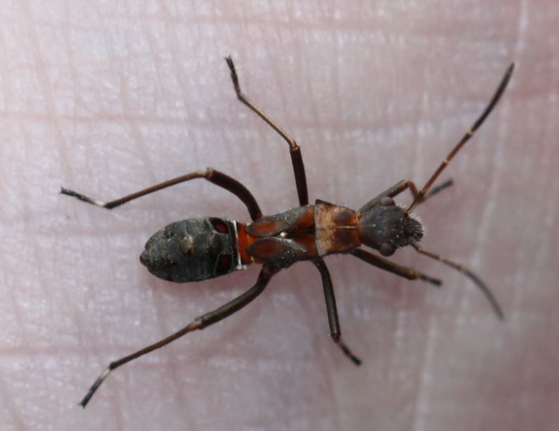 Nymphe von Alydus calcaratus am 21.8.2017 in der Schwetzinger Hardt